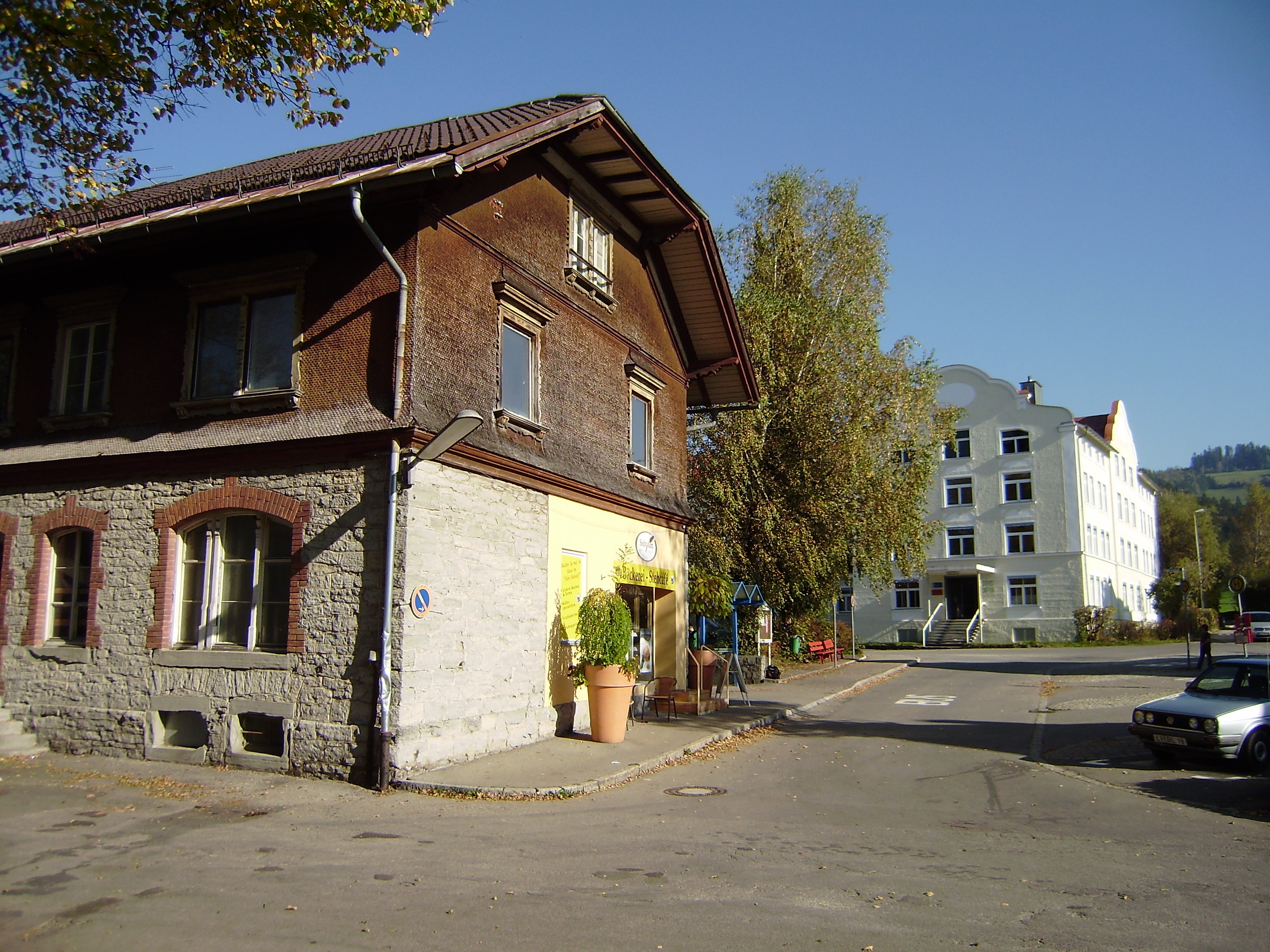 Empfangsgebäude des ehemaligen Bahnhofs Weiler im Allgäu mit Gebäude der ehemaligen Strickerei Karg im Hintergrund